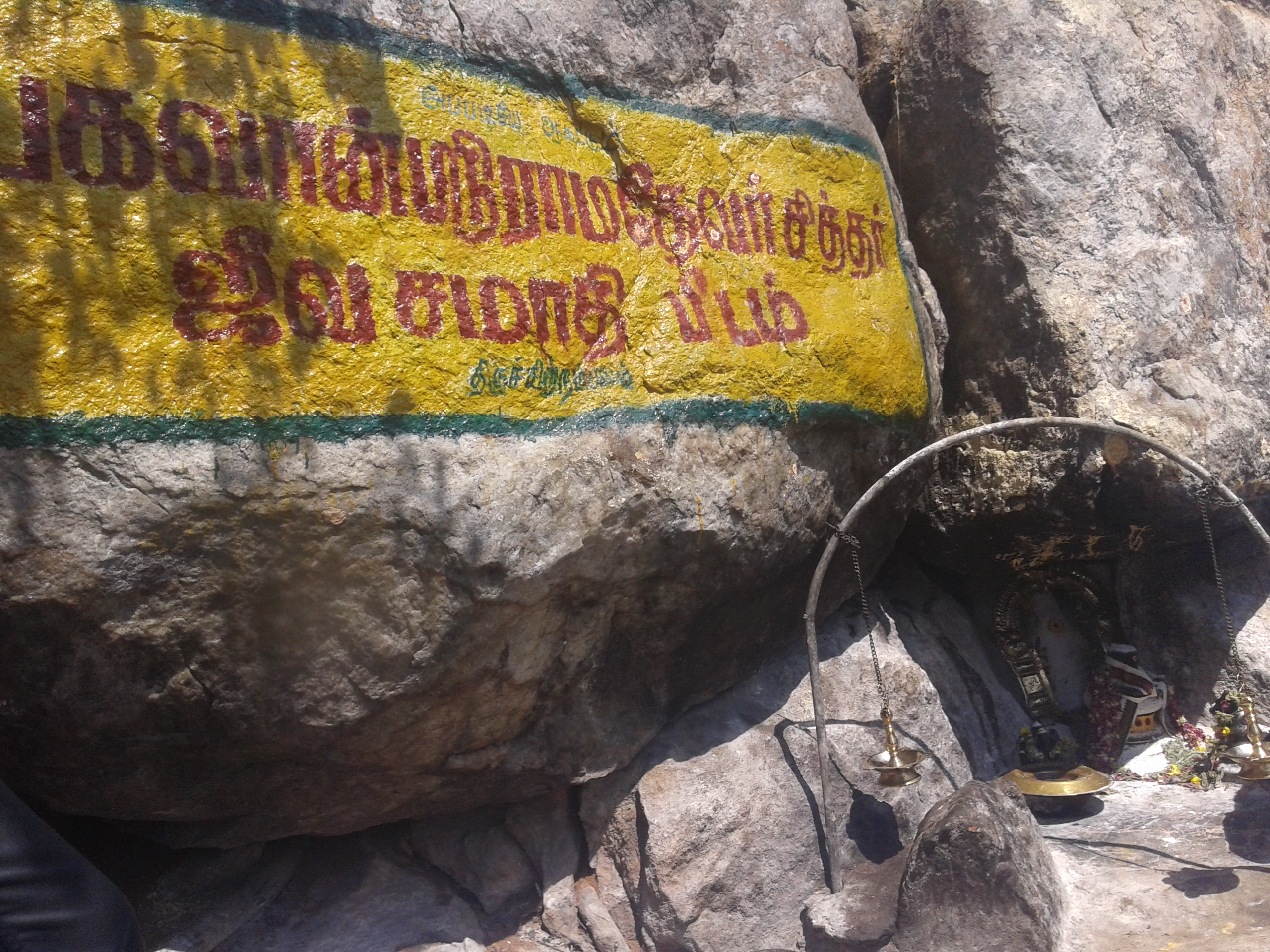 பகவான் ராம தேவர் சித்தர்